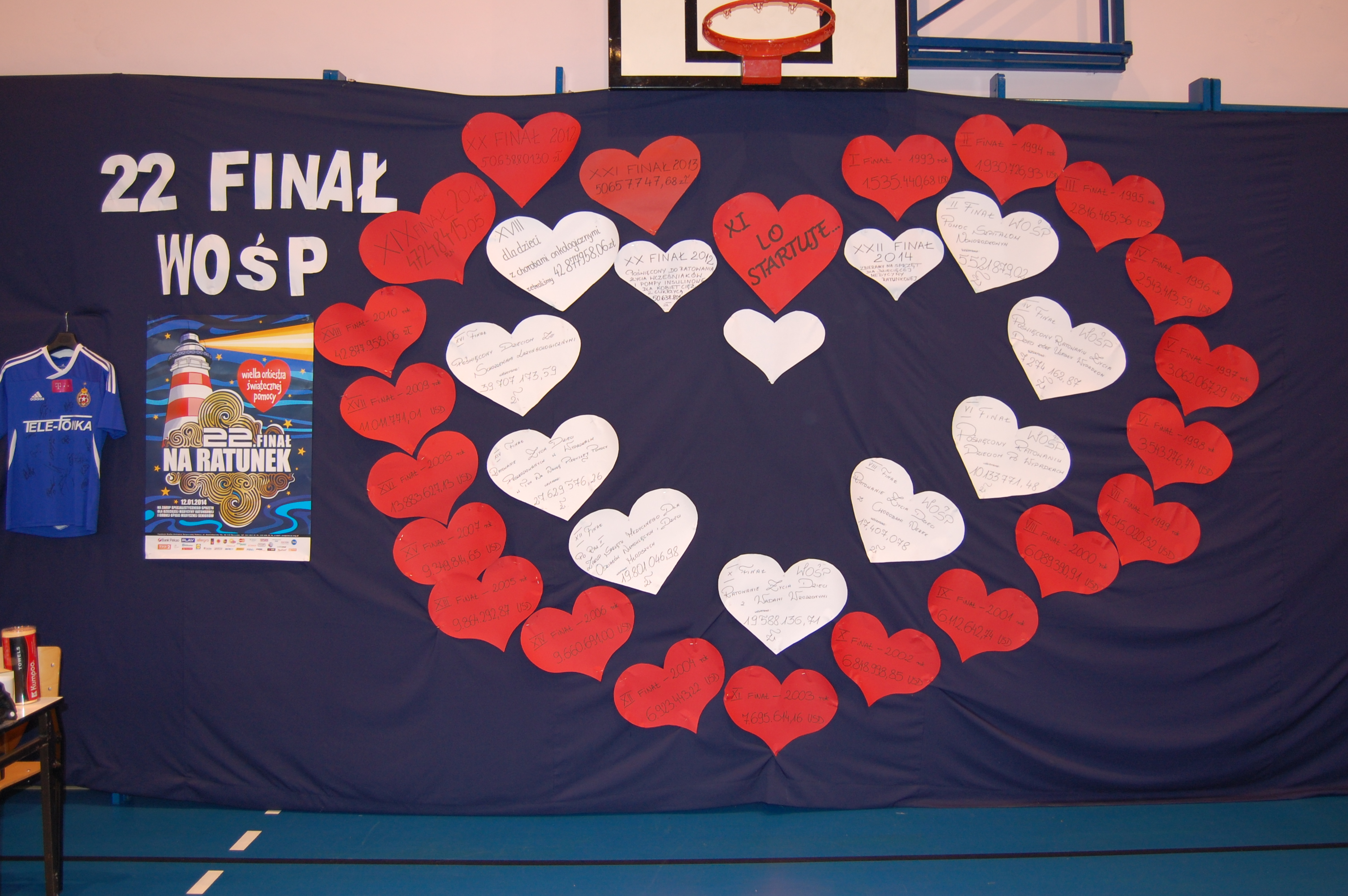 xdvgg